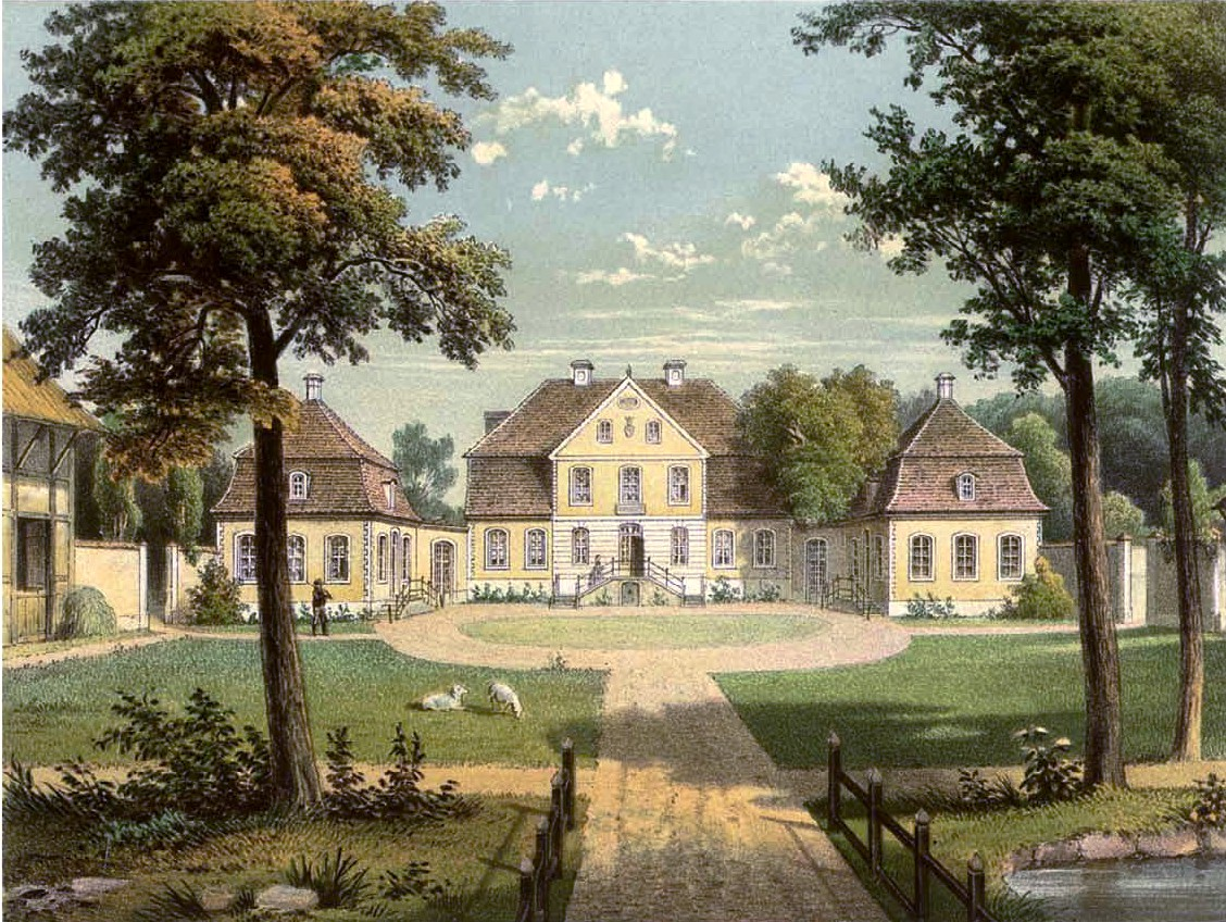 Rittergut Carzitz (Kartzitz), Kreis Rügen